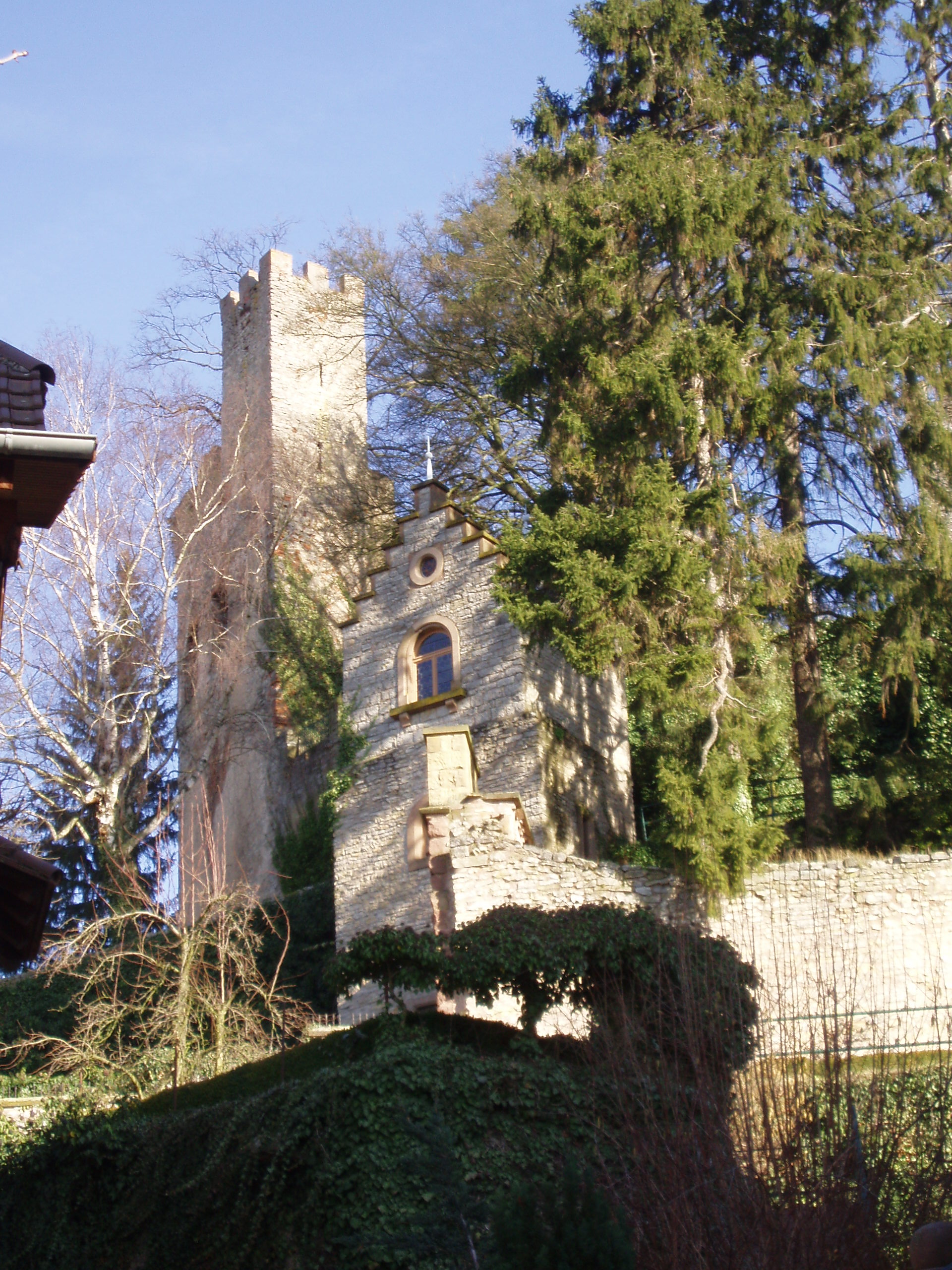 Teil der Burgruine Obergrombach